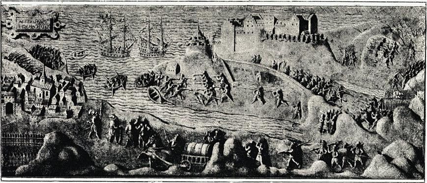 «De Svenskes Beleiring af Akershus Slot 1567. (Efter et Relief paa Kong Frederik den andens Sarkofag i Roskilde Domkirke.) Tegning blandt de Foreningen til Norske Fortidsmindesmærkers Bevaring tilhørende Samlinger.